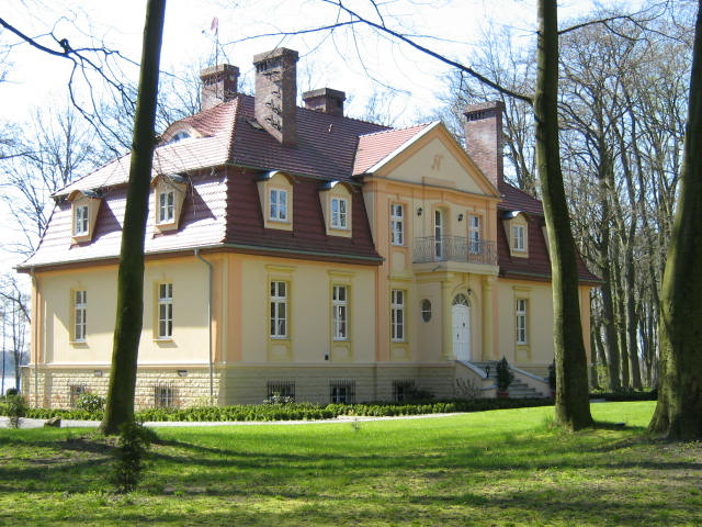 Zabytkowy dwór w Mierzęcinie (zabytek nr rejestr. 1121)